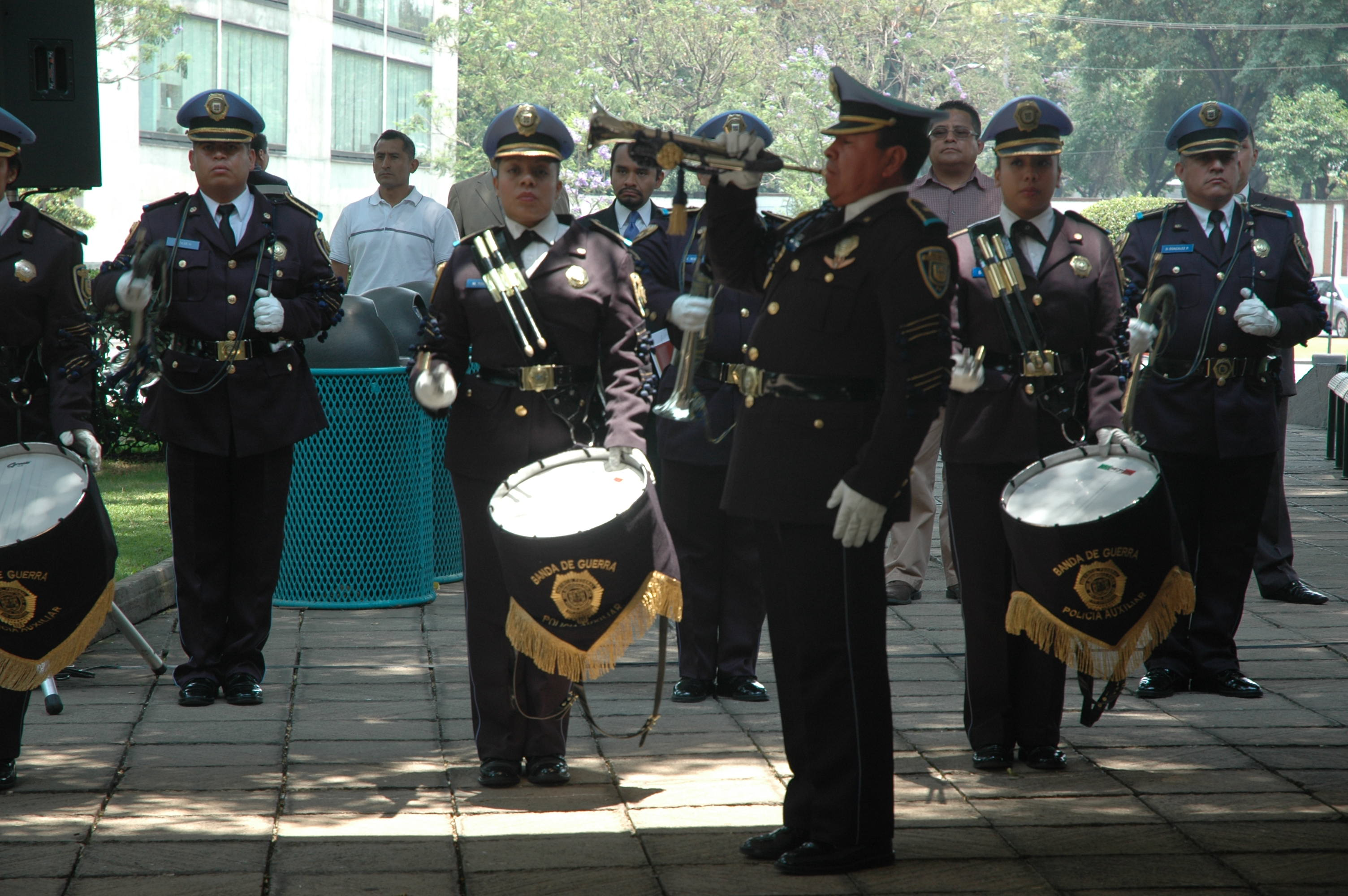 Banda_de_Guerra_de_la_Secretaria_de_Seguridad_Pública en la ceremonia de firmar el Convenio de Colaboración y Vinculación Ciudadana para la Creación de Corredores Seguros Universitarios en ITESM Campus Ciudad de México